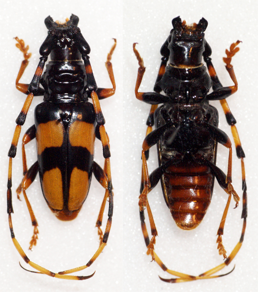 Dupont,1834 Sex: Male Data: 08-2010 - Maderas canyon - Arizona - USA Size: ?